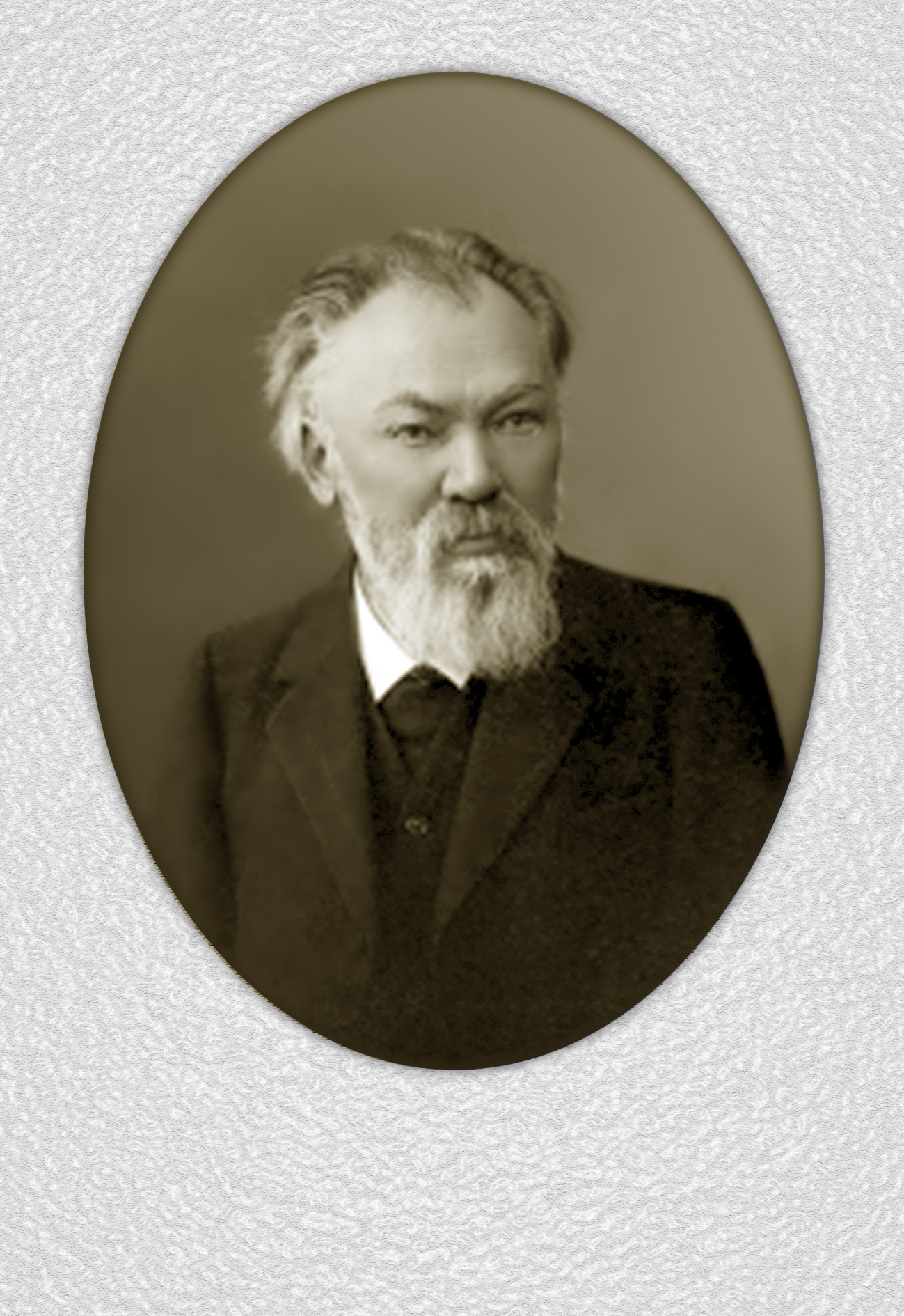 профессор Кербер Бернгард Августович